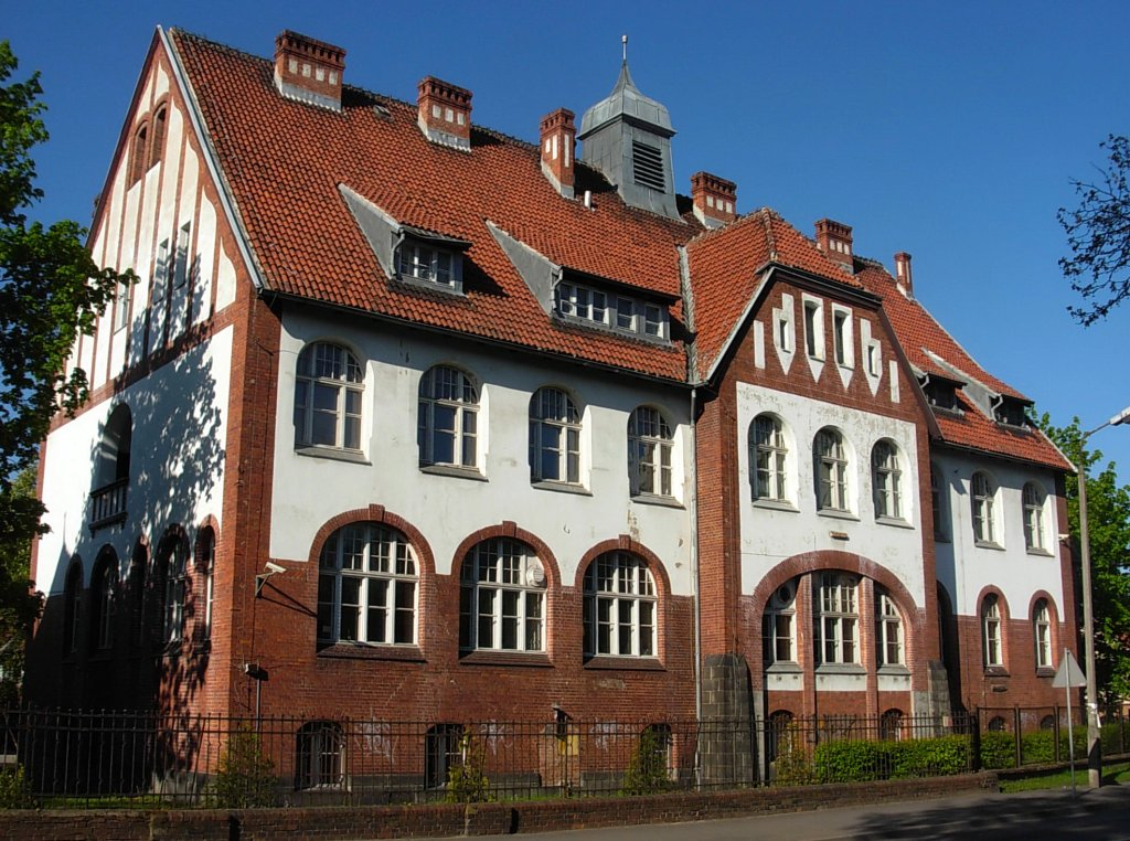 Budynek dawnego Instytutu Rolniczego w Bydgoszczy, ul. Powstańców Wlkp 2, obecnie użytkowany przez UKW